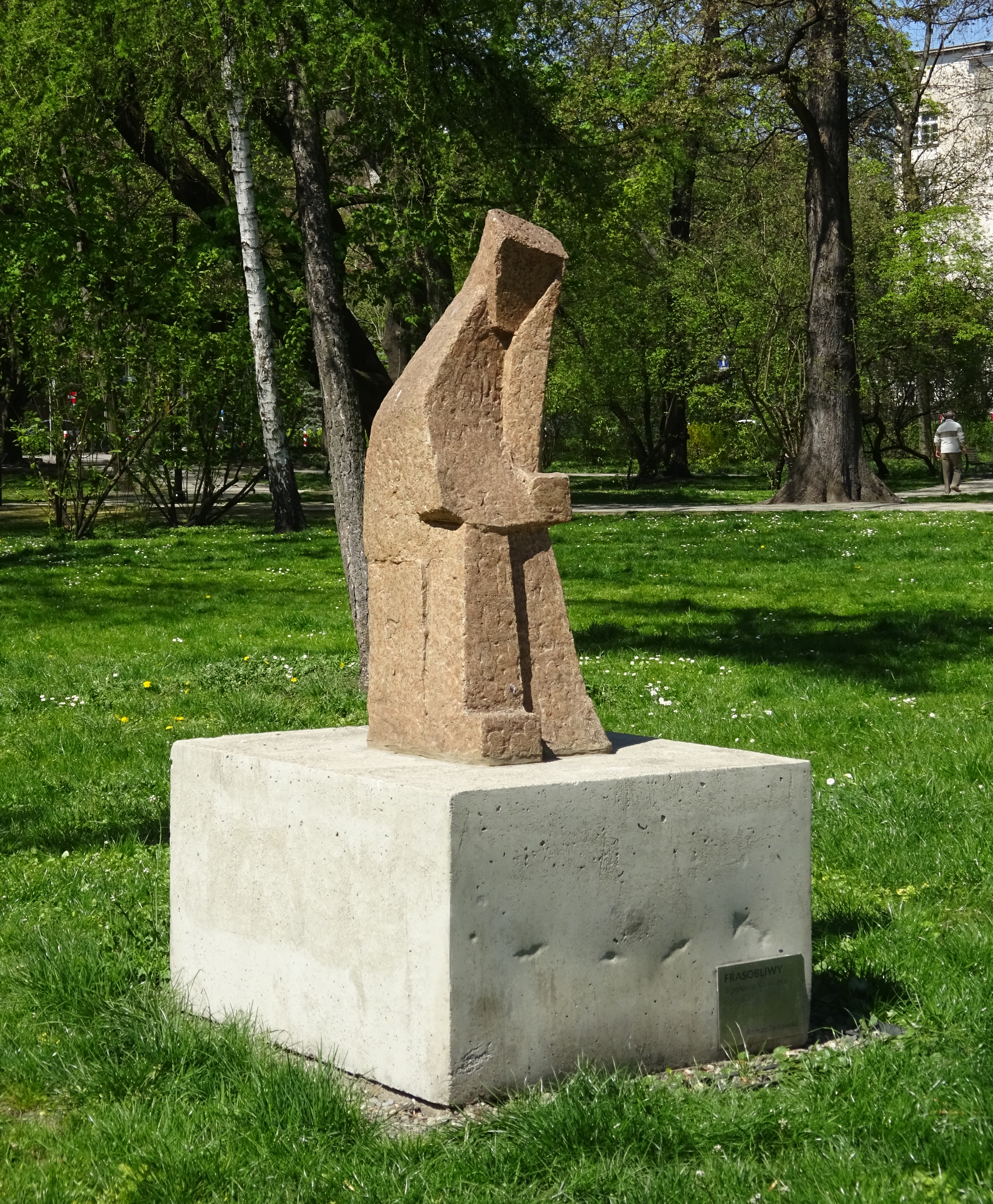 Rzeźba „Frasobliwy”, autorstwa Romana Tarkowskiego z II połowy XX wieku, znajdująca się w Parku Krakowskim w Krakowie.